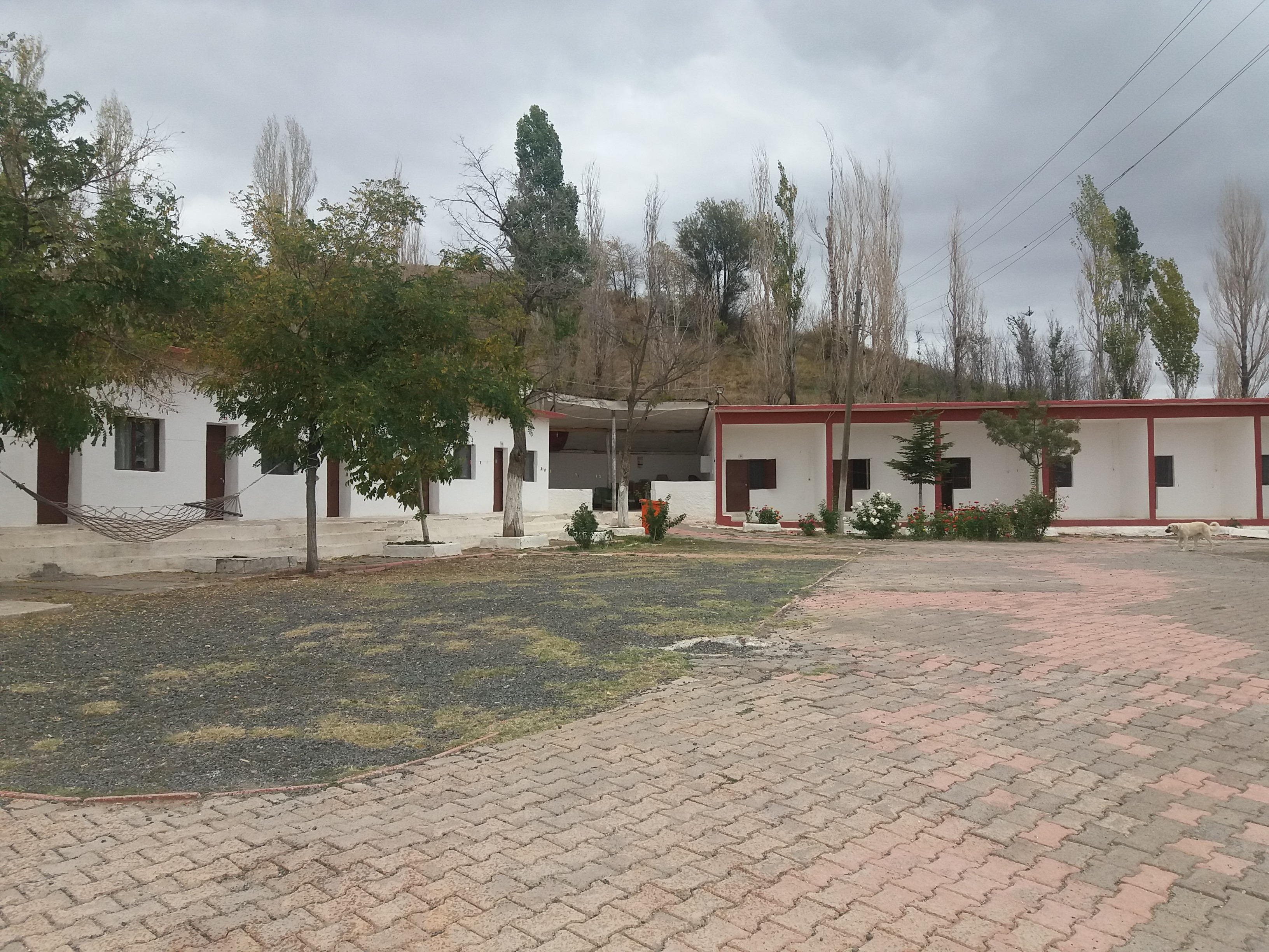 Ortaköy Çermik Alanı